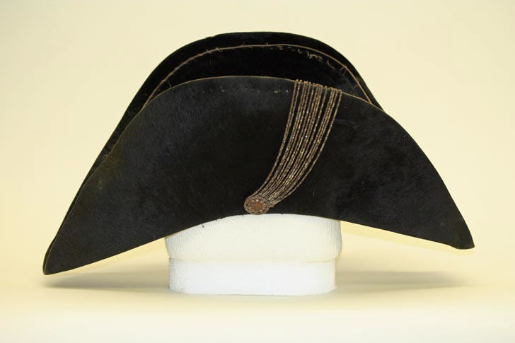 Italian; Hat